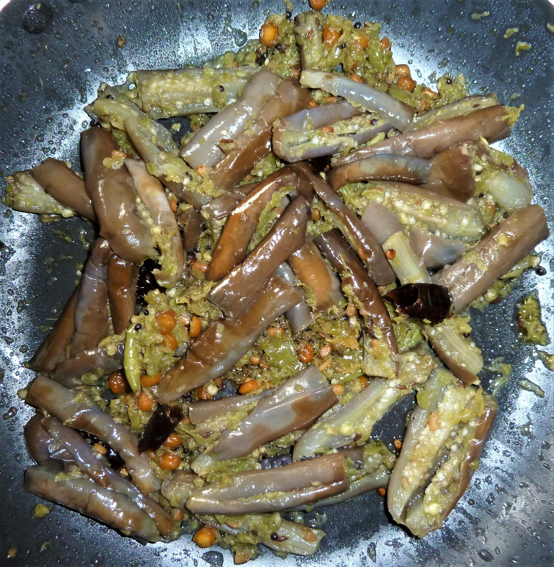 వంకాయ అల్లం పచ్చిమిర్చి కూర